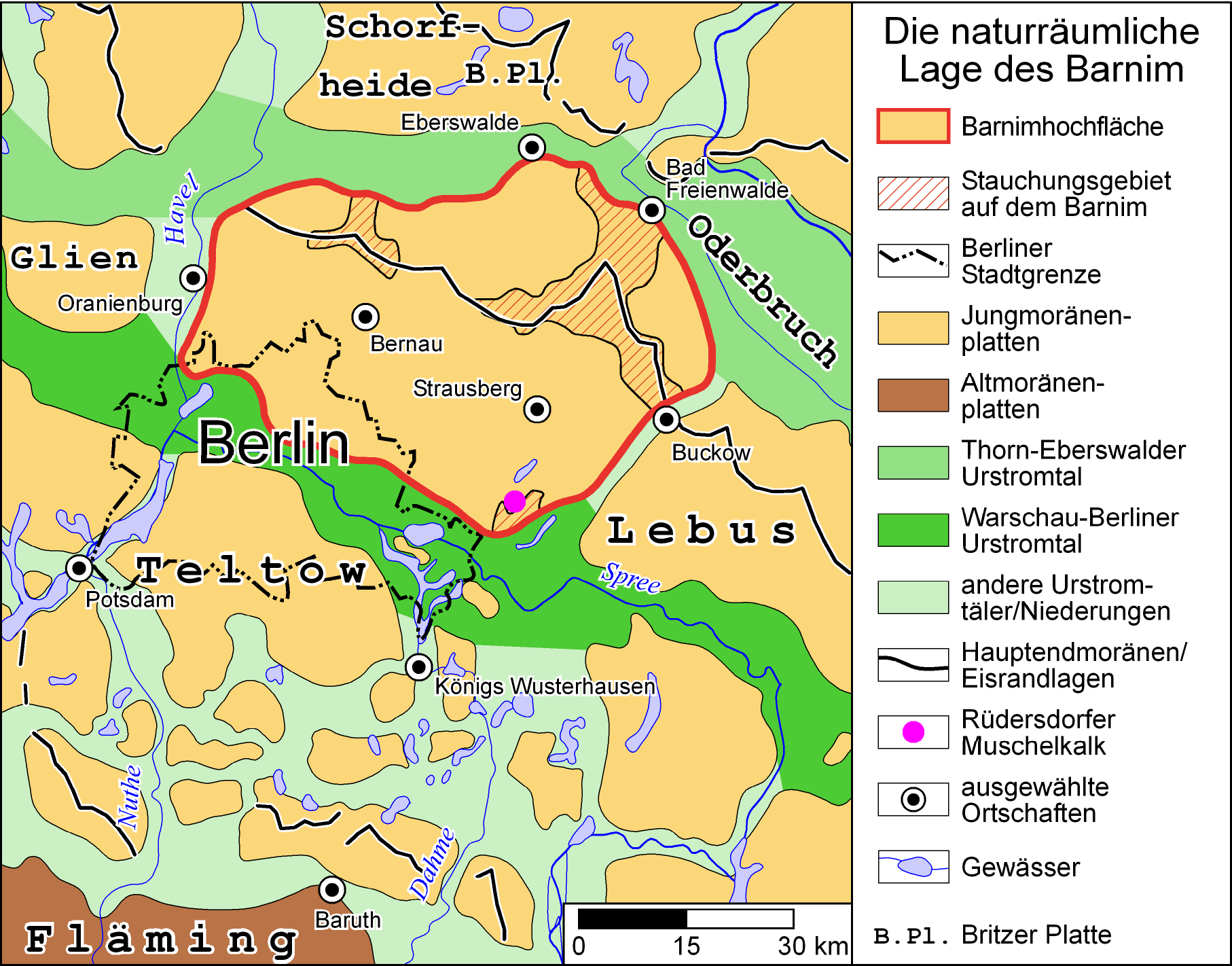 Die naturräumliche Lage des Barnim Summary Zeichnung von Benutzer Grabenstedt 11:12, 21. Nov. 2006 (CET) vereinfacht nach: Atlas zur Geologie von Brandenburg, Werner Stackebrandt und Volker Manhenke (Hrsg.), Landesamt für Geowissenschaften und Rohstoffe Brandenburg (heute Landesamt für Bergbau, Geologie und Rohstoffe Brandenburg, LBGR) 2002, 2. Aufl., 142 S., 43 Karten, ISBN 3-9808157-0-6